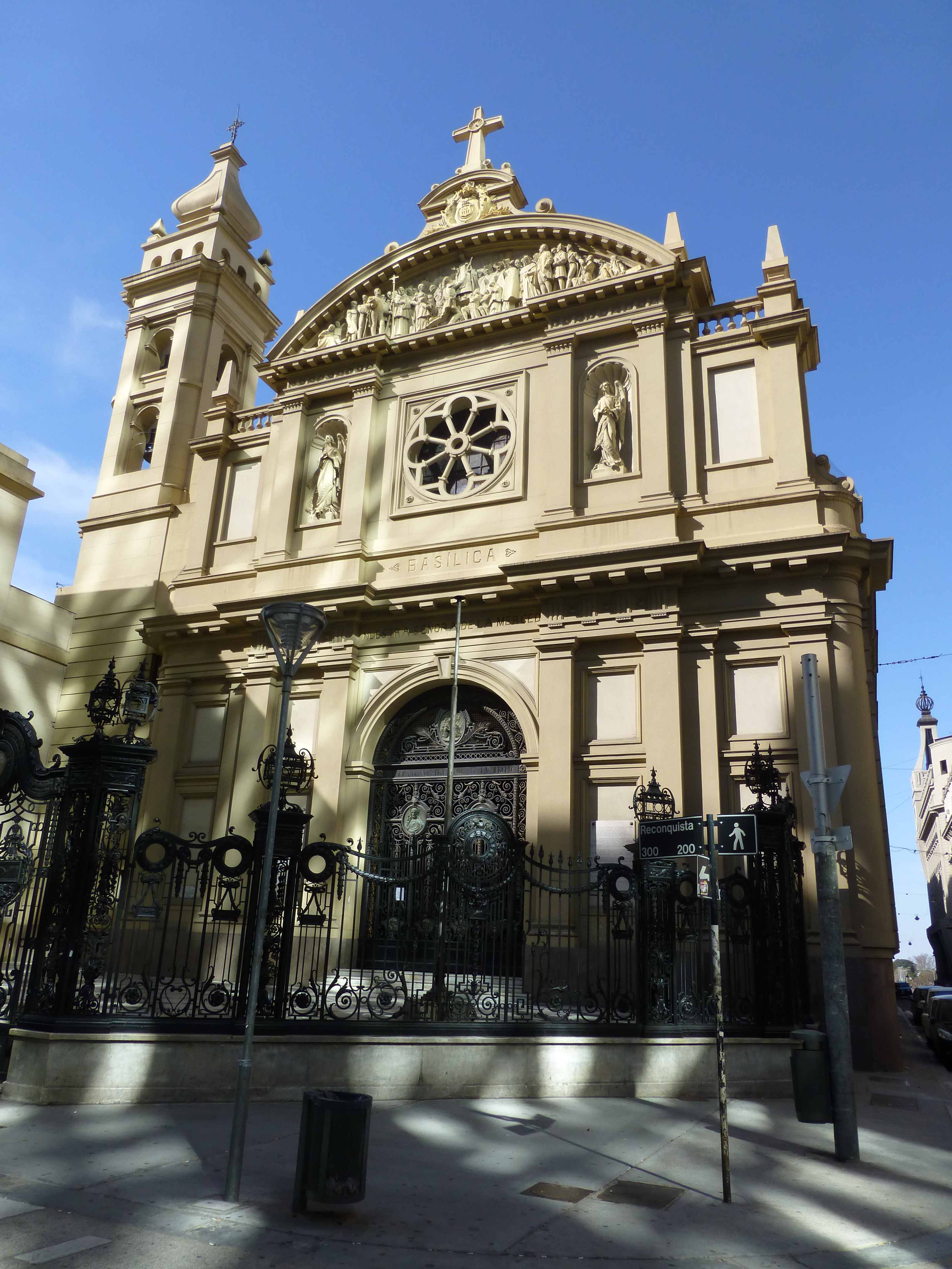 Iglesia de la Merced